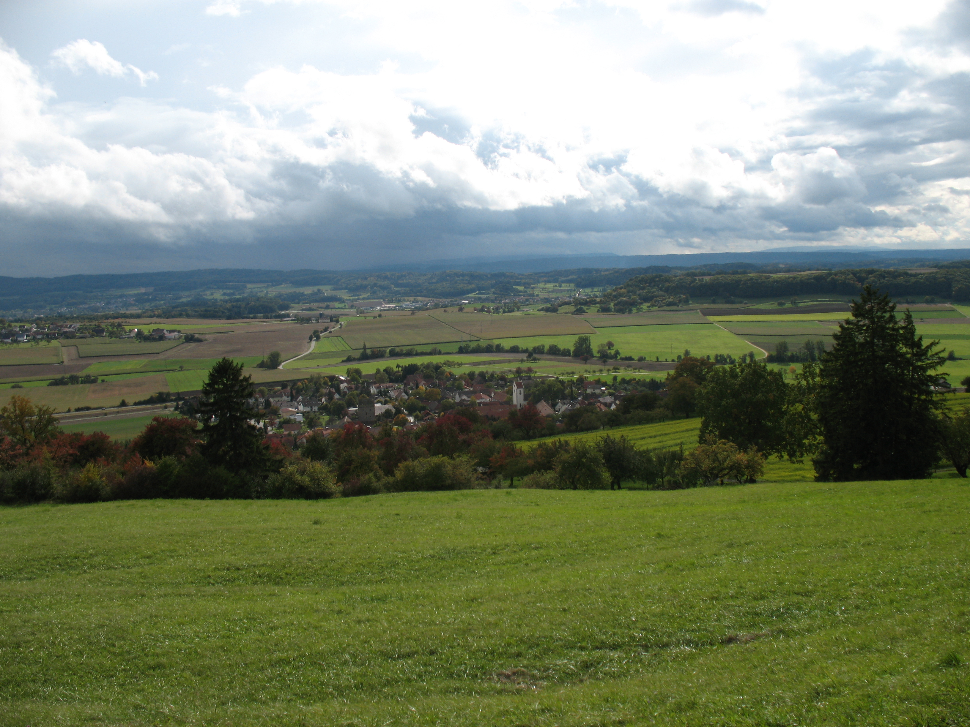 Riedheim vom Hohenstoffeln nach Süden gesehen.